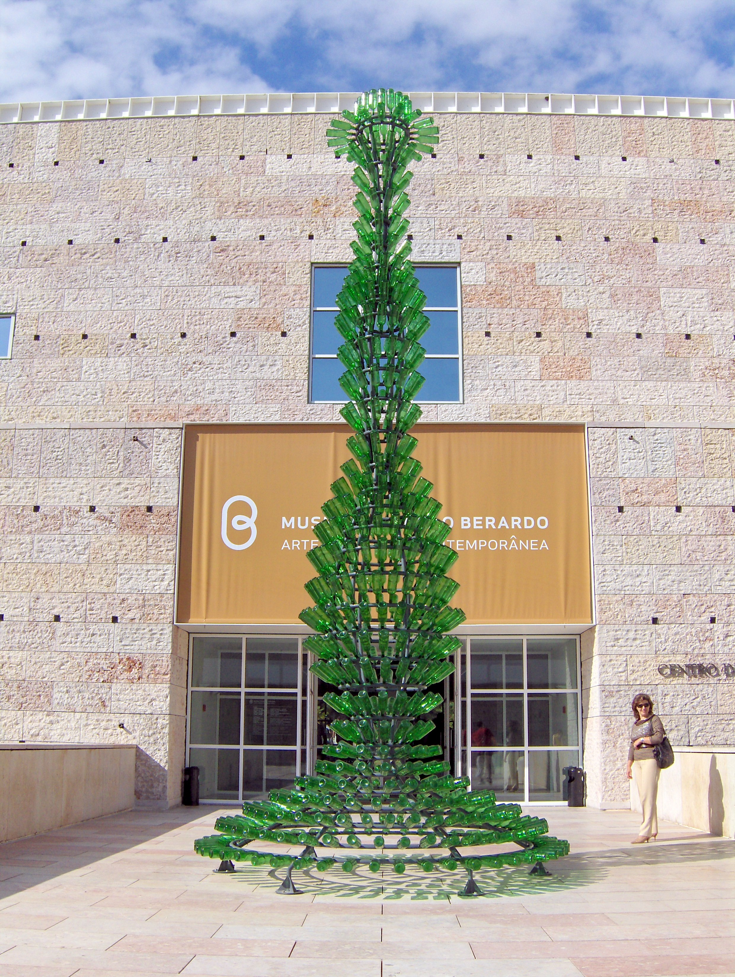 Nectar (2006) de Joana Vasconcelos, no Museu Colecção Berardo, Lisboa, Portugal.